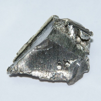 Ytterbium, a soft silvery metallic element.